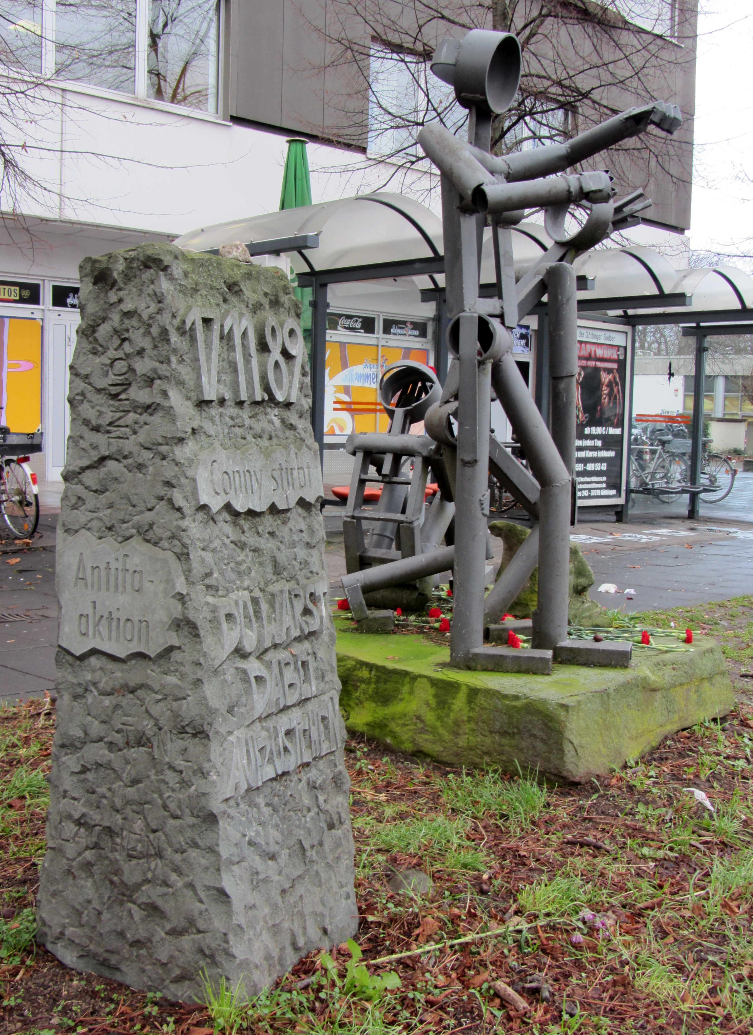 Gedenkstein und Skulptur für Conny Wessmann in der Weender Landstraße in Göttingen. Sie starb am 17. November 1989 am Rande eines Polizeieinsatzes durch einen Verkehrsunfall. Zugrundeliegend waren Auseinanandersetzungen zwischen rechtsextremer und autonomer Szene.